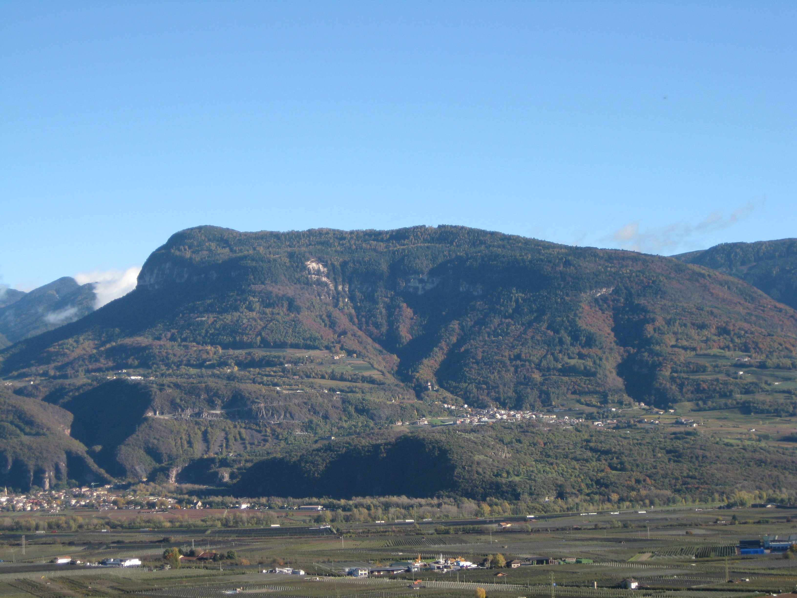 Der Cislon oder Cucul von Westen